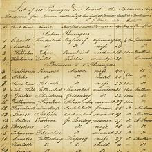 DAD Passagierliste